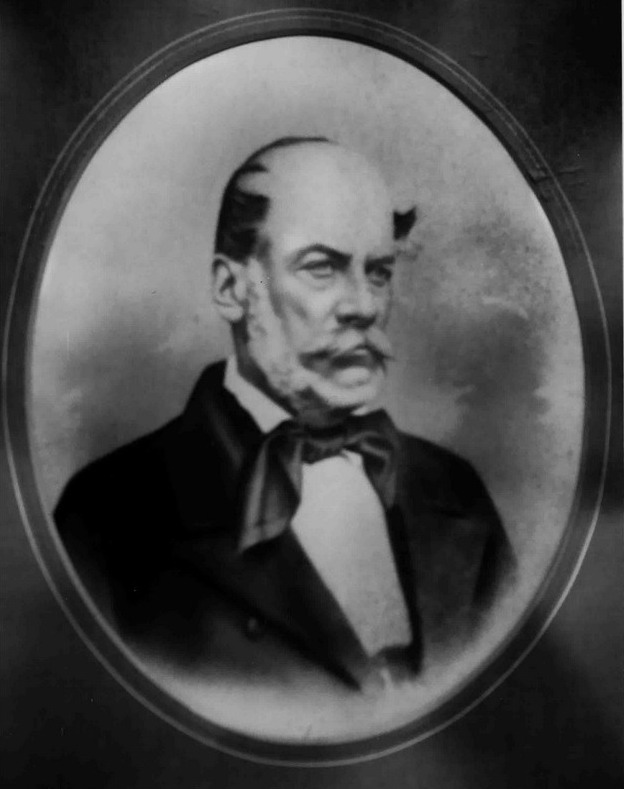 Boierul român Alecu Botez-Forăscu. Pictură realizată în anii '60 ai secolului al XIX-lea.